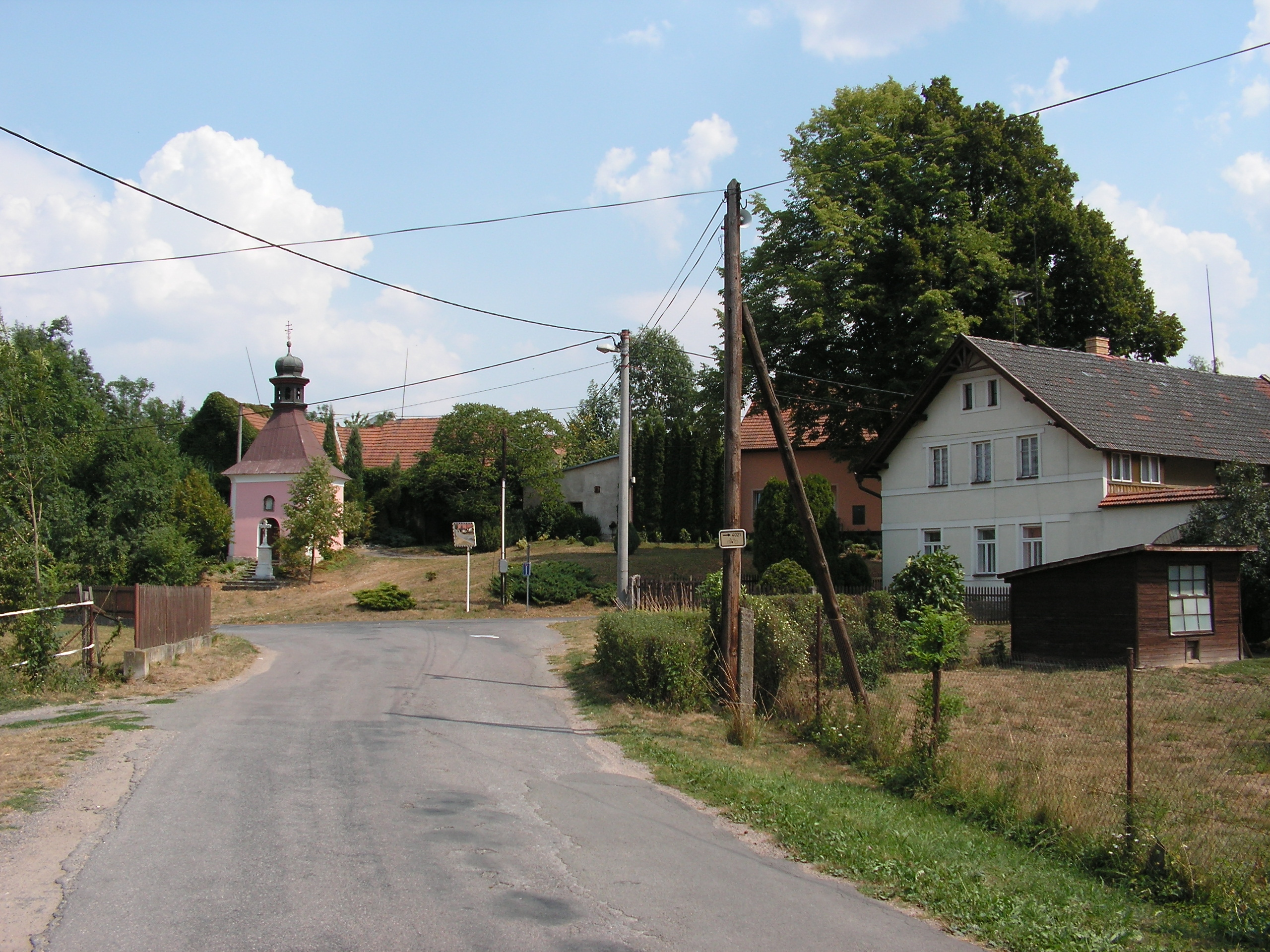 Obec Tržek se nachází severozápadně od Litomyšle v okrese Svitavy